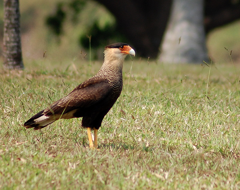 Jardim Botânico de São Paulo